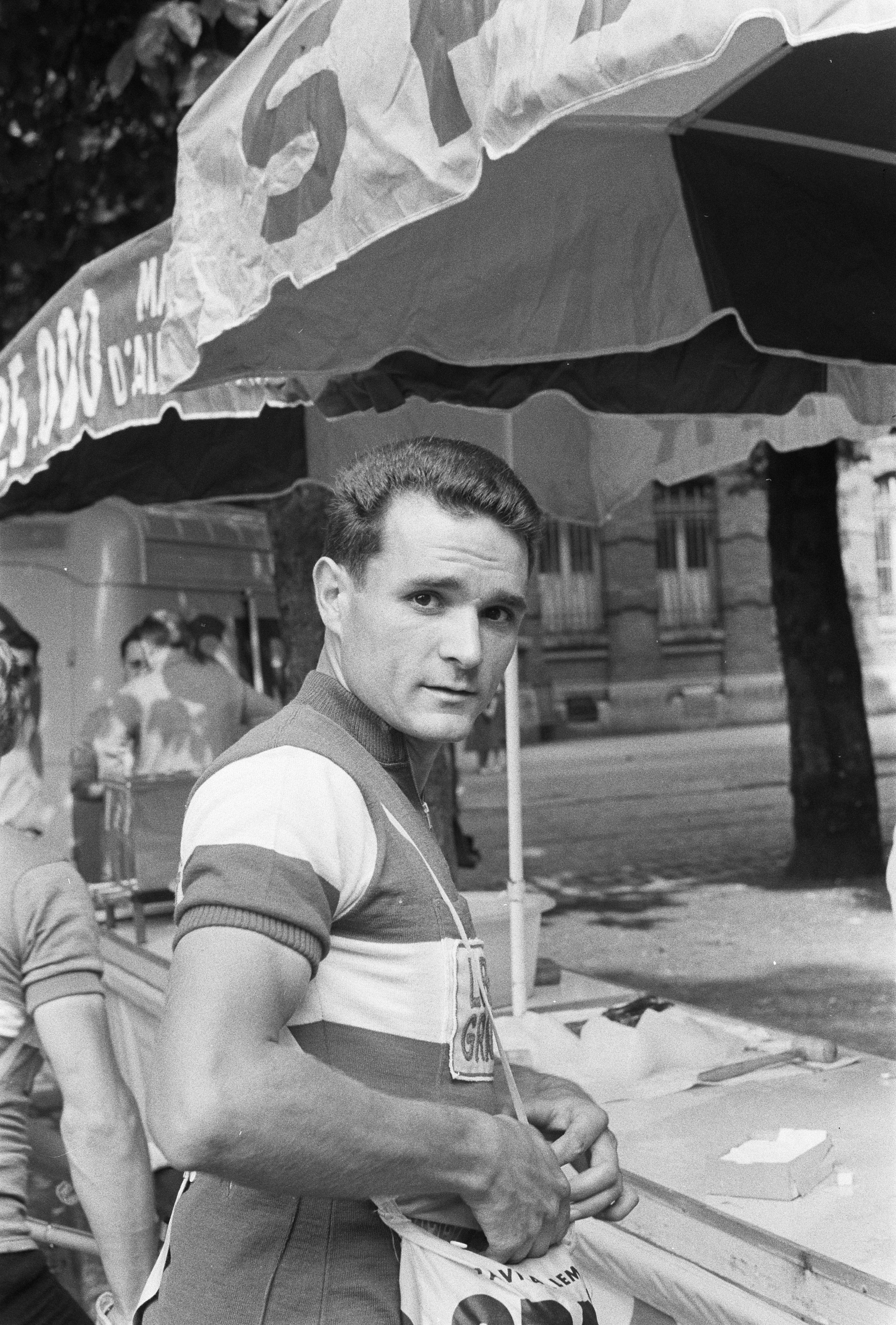 Collectie / Archief : Fotocollectie Anefo Reportage / Serie : [ onbekend ] Beschrijving : Tour de France , voor de start Anglade voor de start Datum : 7 juli 1960 Locatie : Frankrijk Trefwoorden : sport, wielrennen Persoonsnaam : Anglade, Henri Instellingsnaam : Tour de France Fotograaf : Pot, Harry / Anefo, [onbekend] Auteursrechthebbende : Nationaal Archief Materiaalsoort : Negatief (zwart/wit) Nummer archiefinventaris : bekijk toegang 2.24.01.05 Bestanddeelnummer : 911-3770